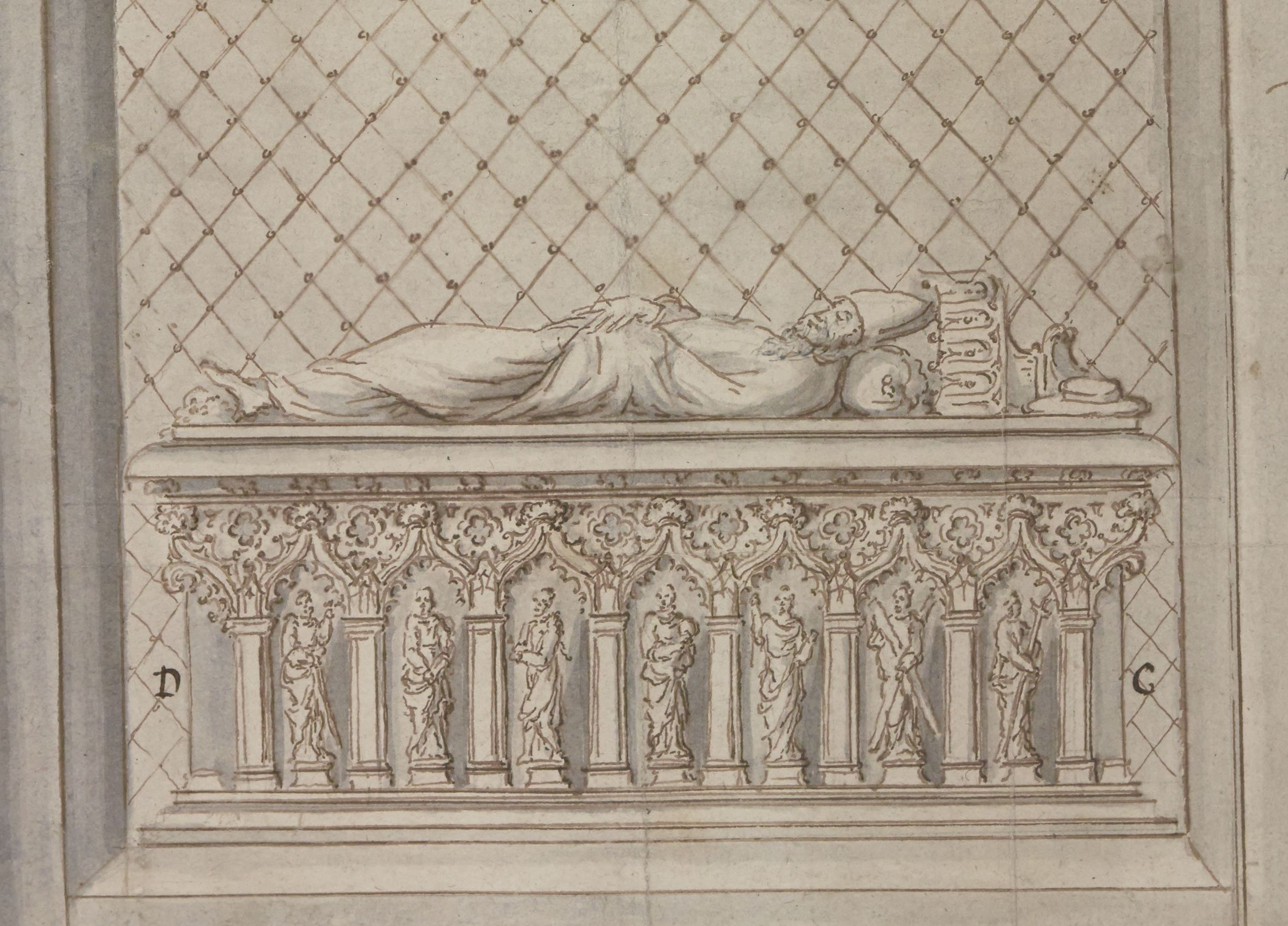 coupe longitudinale de Saint-Martial de Limoges et tombeau du cardinal d'Aigrefeuille, extrait des papiers de Montfaucon.